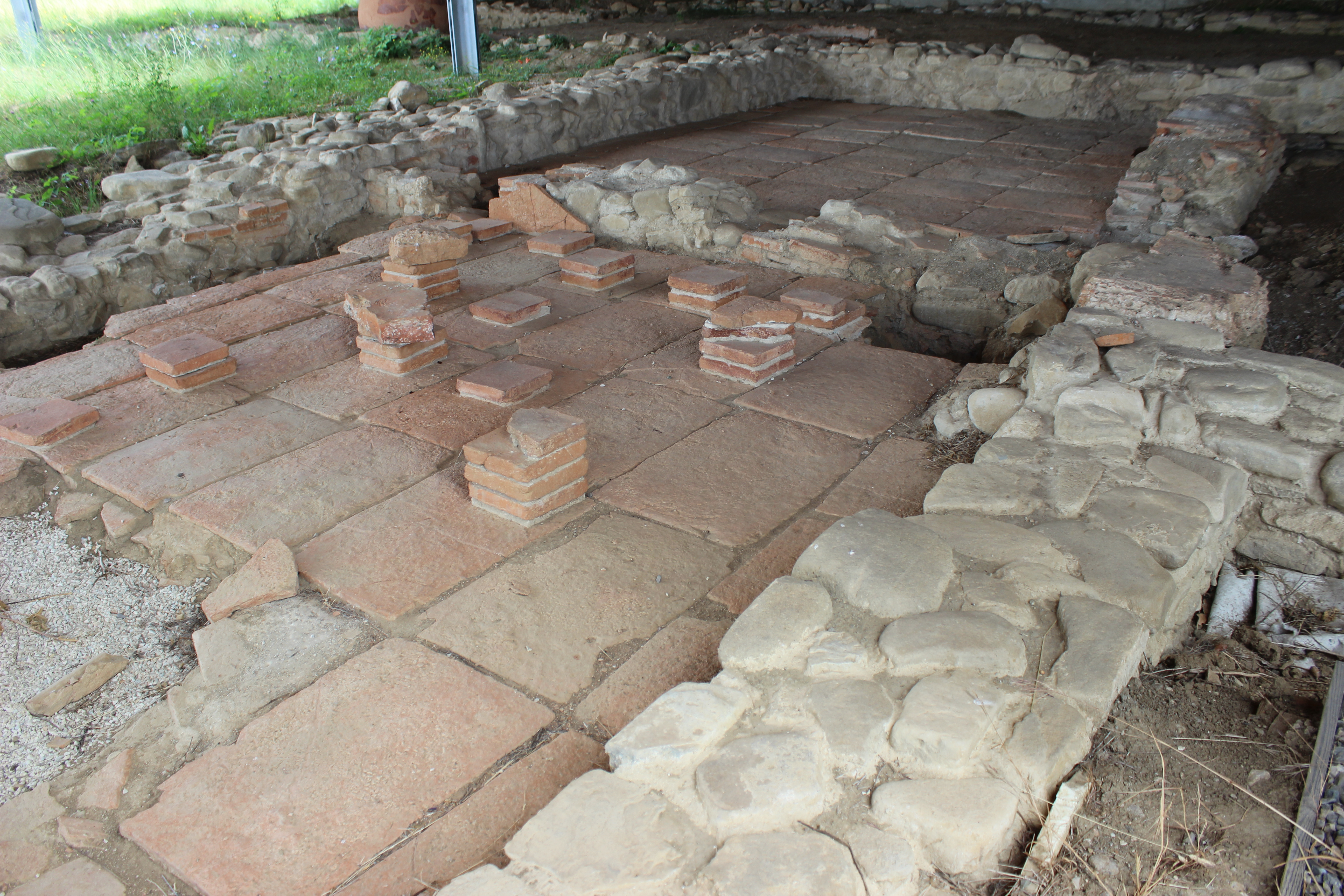 San Giustino. Restos de la villa de Plinio el Joven.